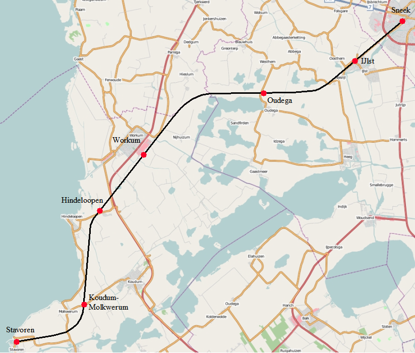 Traject Friese Stoomtrein Sneek-Stavoren